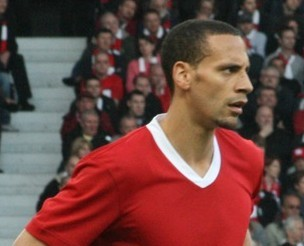 Rio Ferdinand